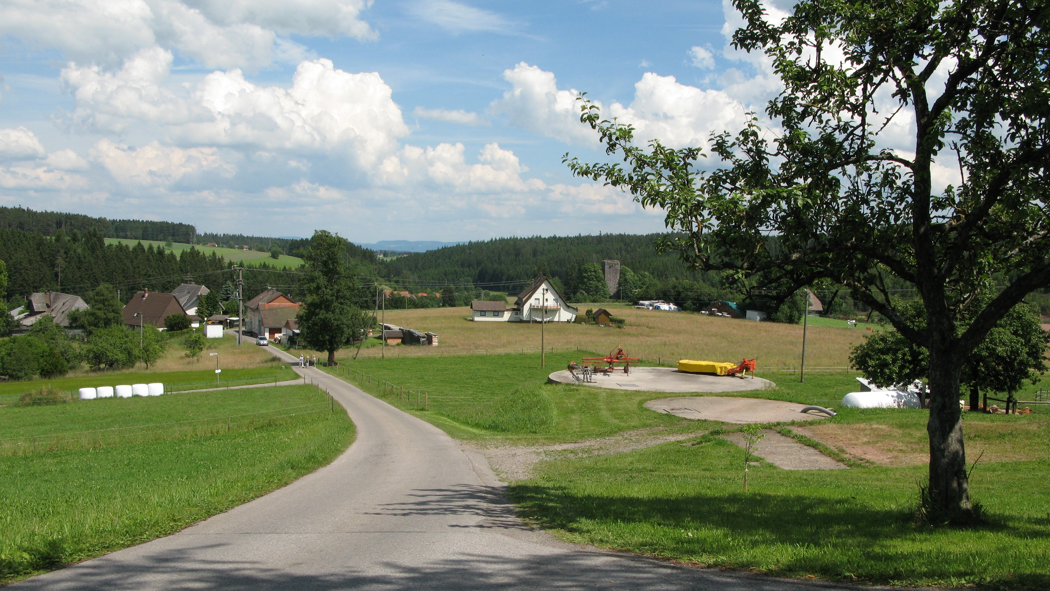 Blick oberhalb der Ortschaft Martinsweiler (Königsfeld im Schwarzwald) in östlicher Richtung zur Ruine Waldau und Schwäbische Alb auf dem Schwarzwald-Querweg Rottweil–Lahr im Schwarzwald.